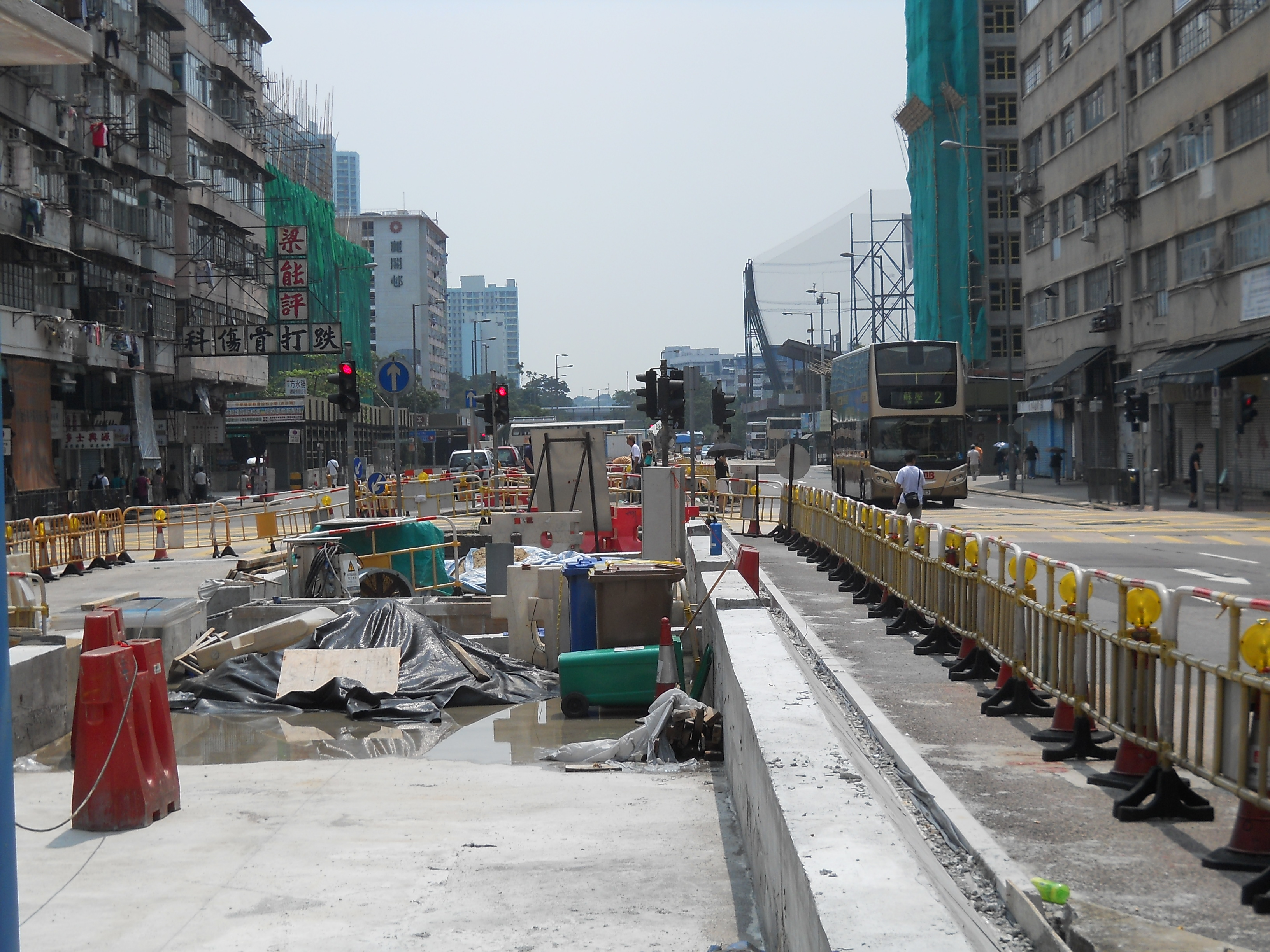 中文（香港）: 已覆蓋的東京街渠